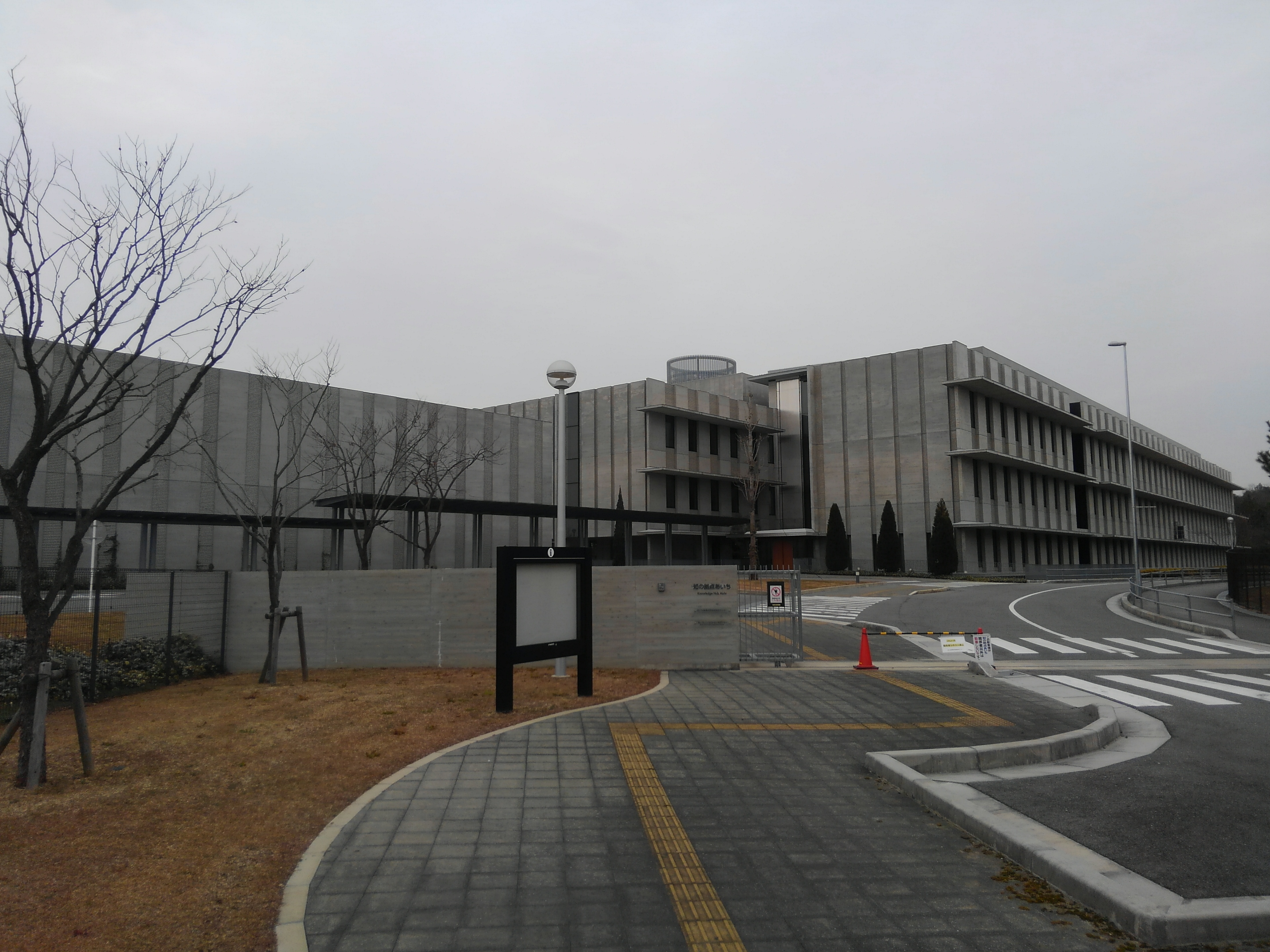 あいち産業科学技術総合センター本部（知の拠点あいち）